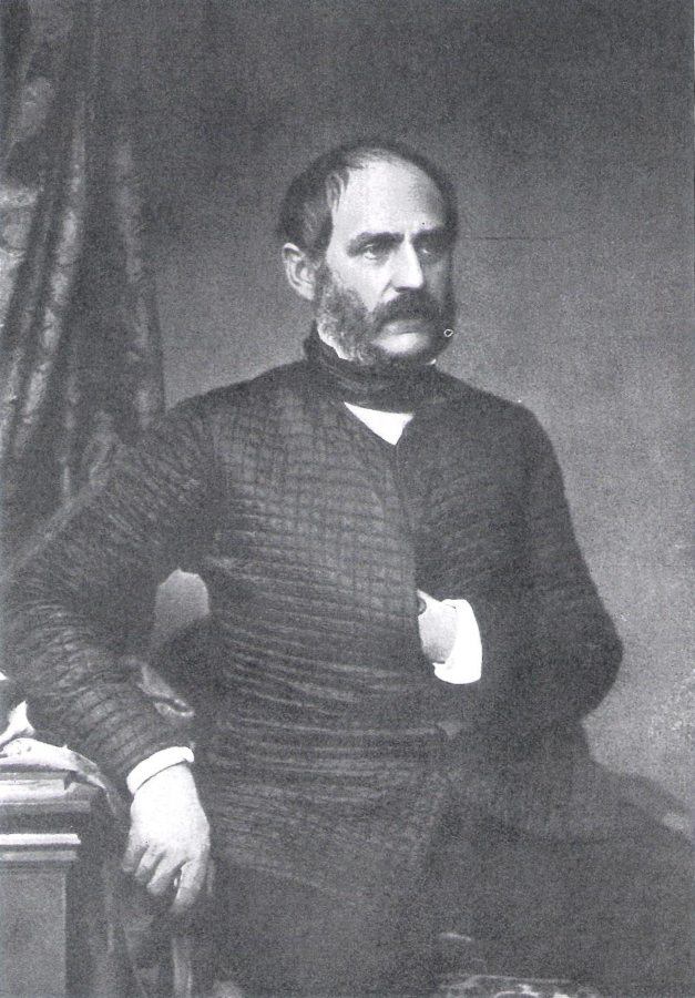 Franz Peter Buhl, Politiker und Winzher aus Deidesheim